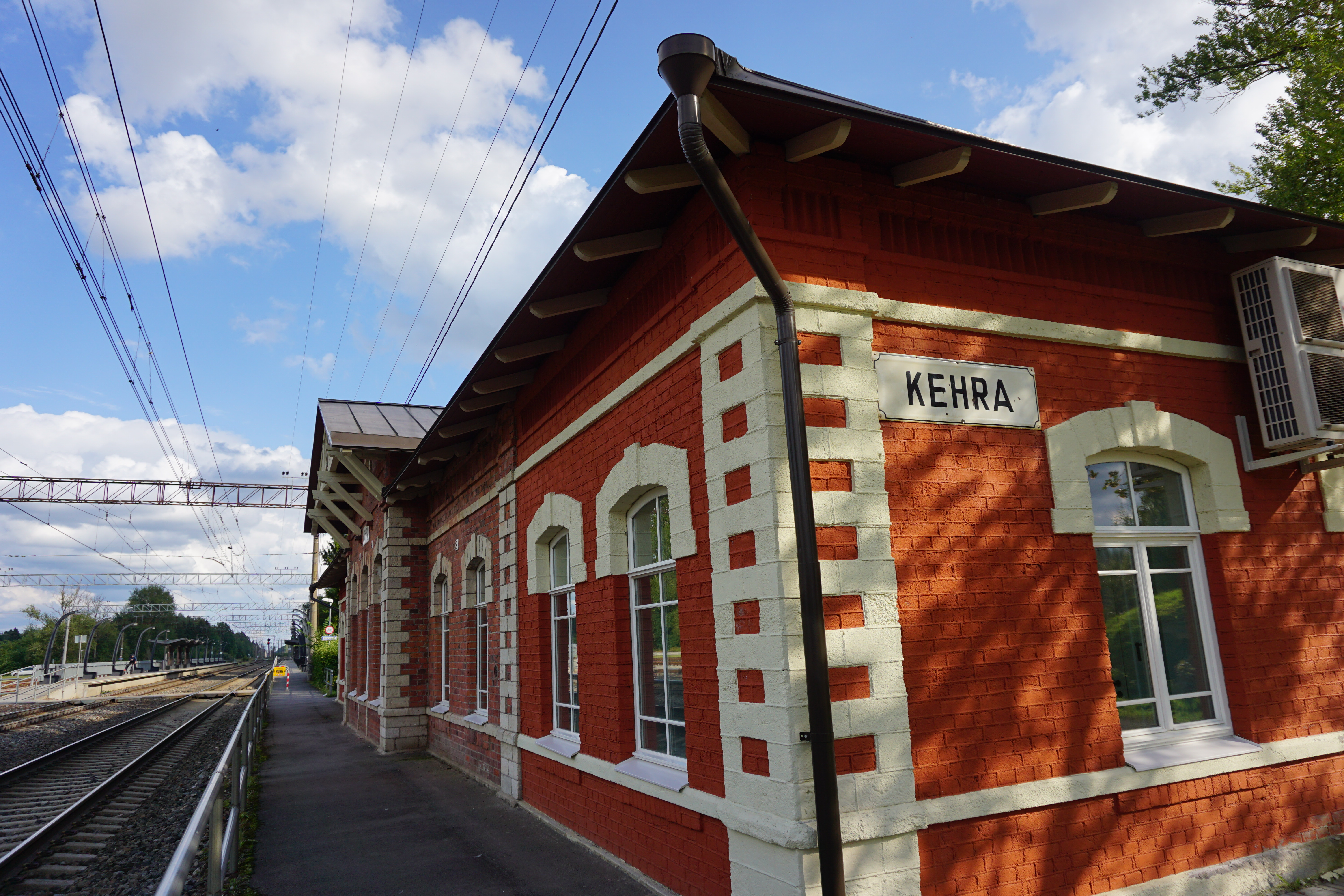 Kehra renoveeritud jaamahoone. Jaamahoones tegutseb söögikoht ja muuseum.